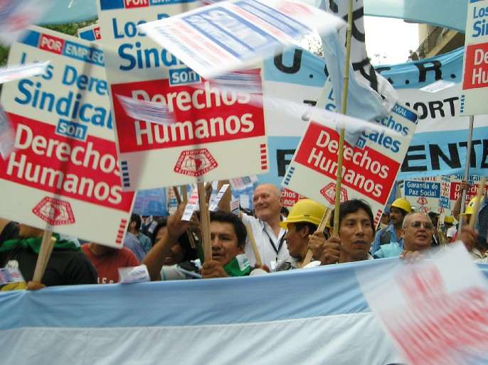 Marcha obrera en Argentina, Los derechos sindicales son derechos humanos. Lugar: Buenos Aires, Argentina. La foto es cargada por el autor.